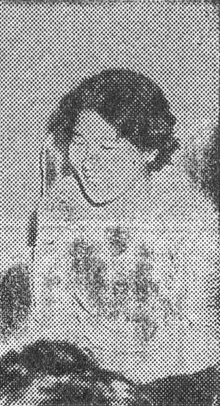 대한민국의 소설가 겸 작가 허근욱. 소설가 박노문의 부인, 독립운동가 겸 여성 해방 운동가 허정숙의 이복 여동생, 변호사 겸 민족운동가 허헌의 사위